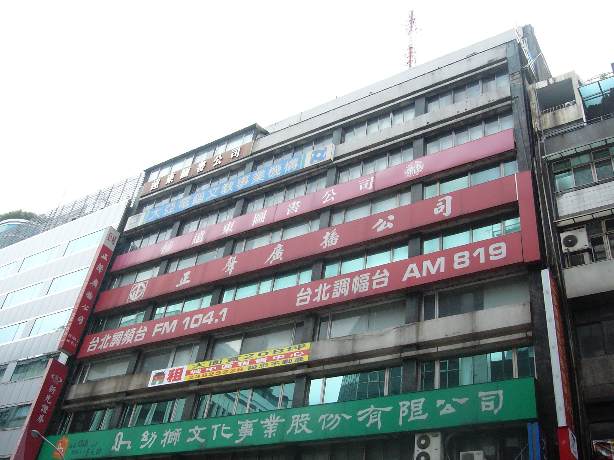 重慶大樓，位於臺北市中正區重慶南路一段66之1號，幼獅文化、遠東圖書、新光證券、正聲廣播公司總部皆設於其內。